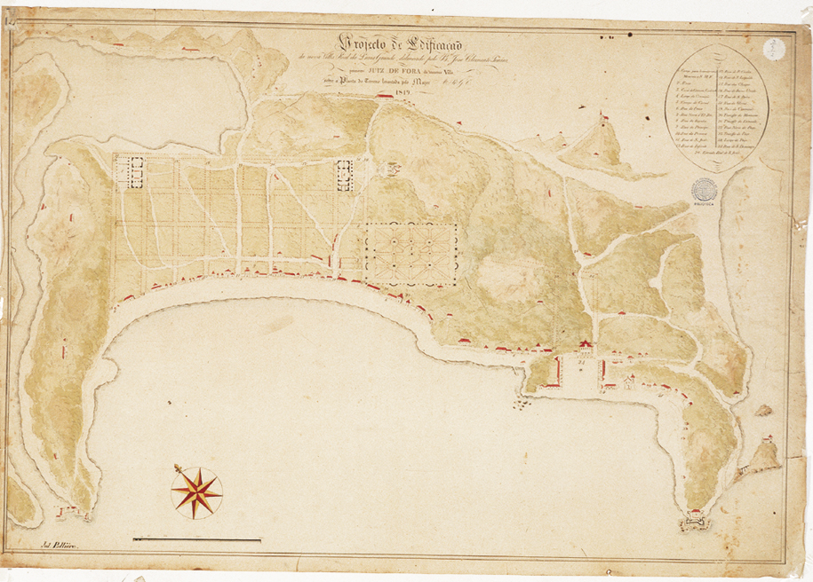 Projecto de Edificação da nova Villa Real de Praia Grande, delineado pelo (...) José Clemente Pereira primeiro Juiz de Fora da mesma Villa sobre a Planta do Terreno levantada pelo Major Arnaud Julien Pallière em 1819. “Entre 1819 e 1821 estava no Brasil o francês Arnaud Julien Pallière que nos deixou uma coleção significativa de desenhos, inclusive plantas e vistas de vilas e cidades. Nesse trabalho, Pallière mostra o projeto para edificação da então chamada ‘Villa Real da Praia Grande’, que foi desenhada pelo Juiz de Fora José Clemente Pereira, origem da atual cidade de Niterói. A legenda deixa claro que o traçado foi elaborado pelo Juiz de Fora, com base no levantamento do terreno realizado por um militar. Junto à praia, registra o que parece ser um casario e, à direita, uma praça com uma igreja e uma edificação de maior porte, que a legenda indica como o Largo do Paço.”